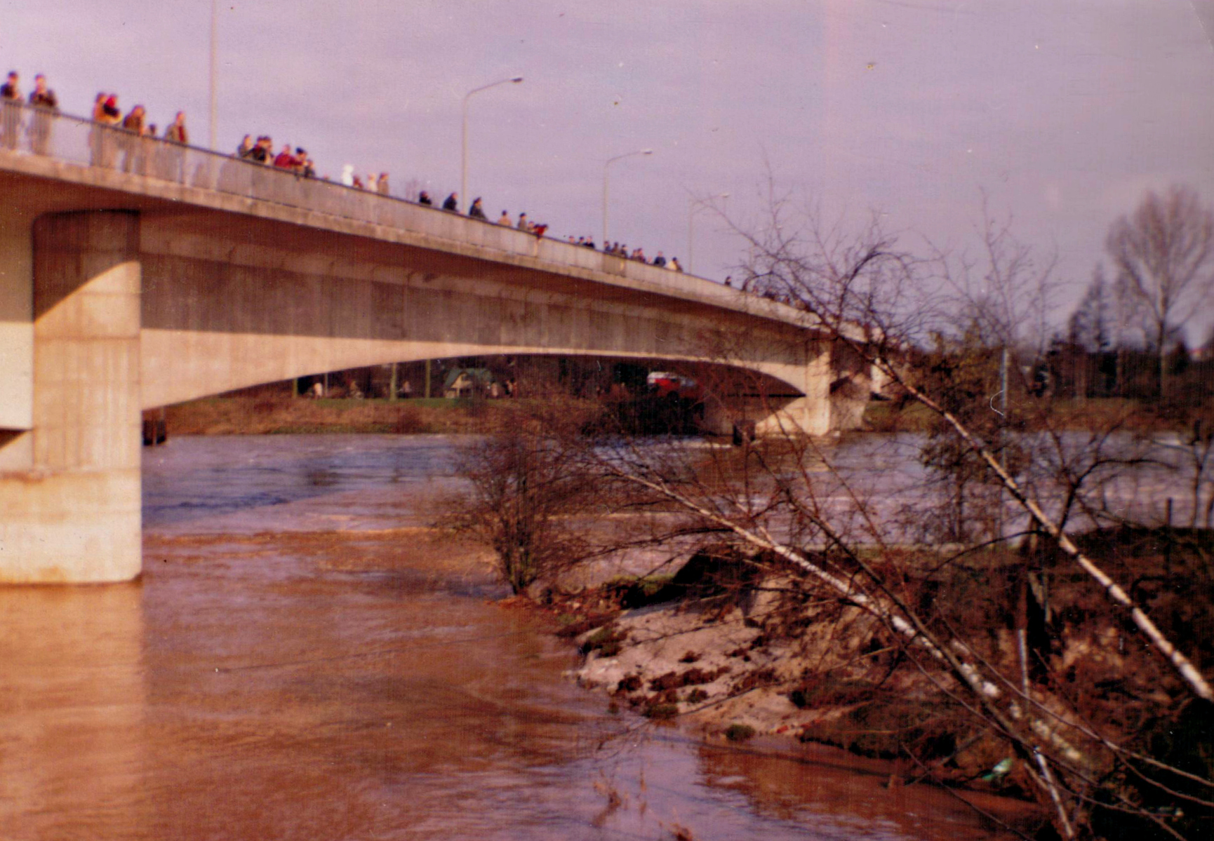 Weserdurchbruch 1981, Bereich Erdbeerbrücke